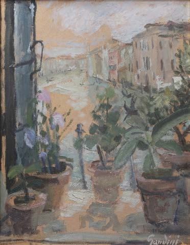 Veduta del Canal Grande by Giola Gandini